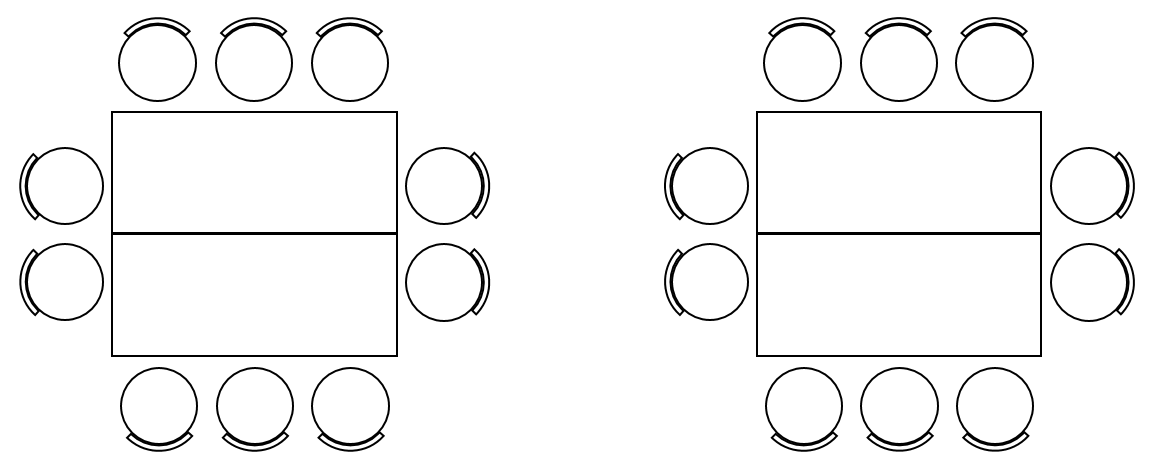 Bordoppsett Firkantede gruppebord